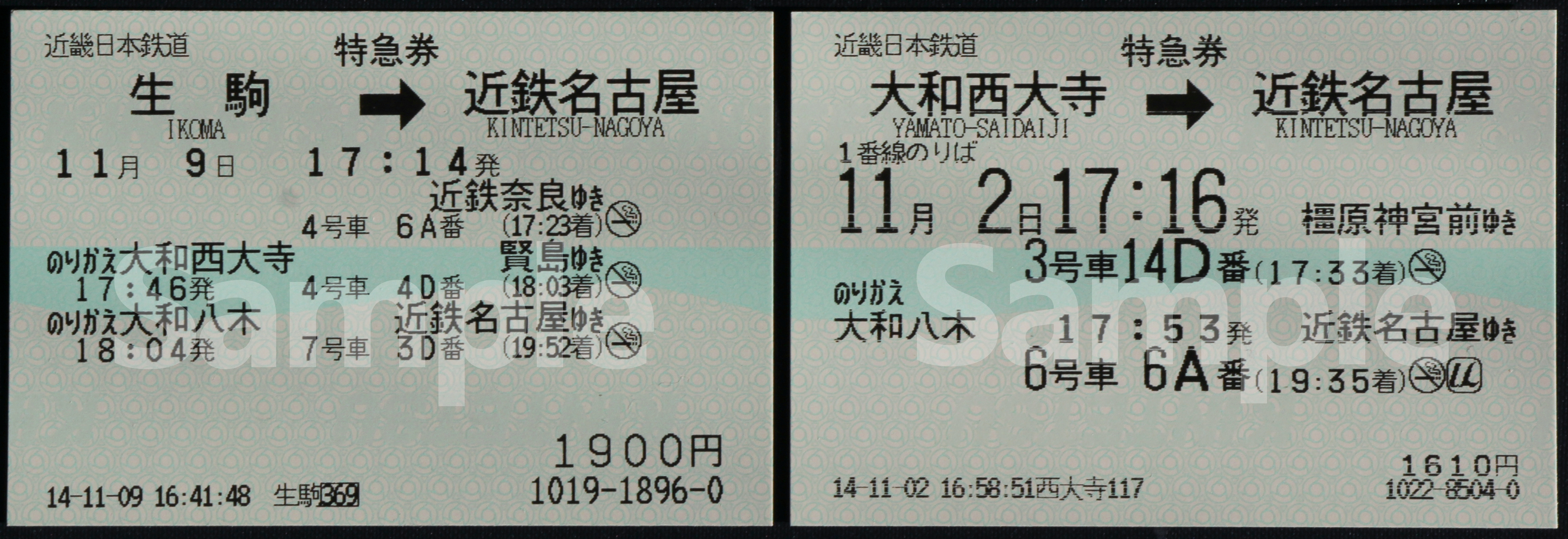 乗り継ぎ利用に配慮した近鉄の特急券